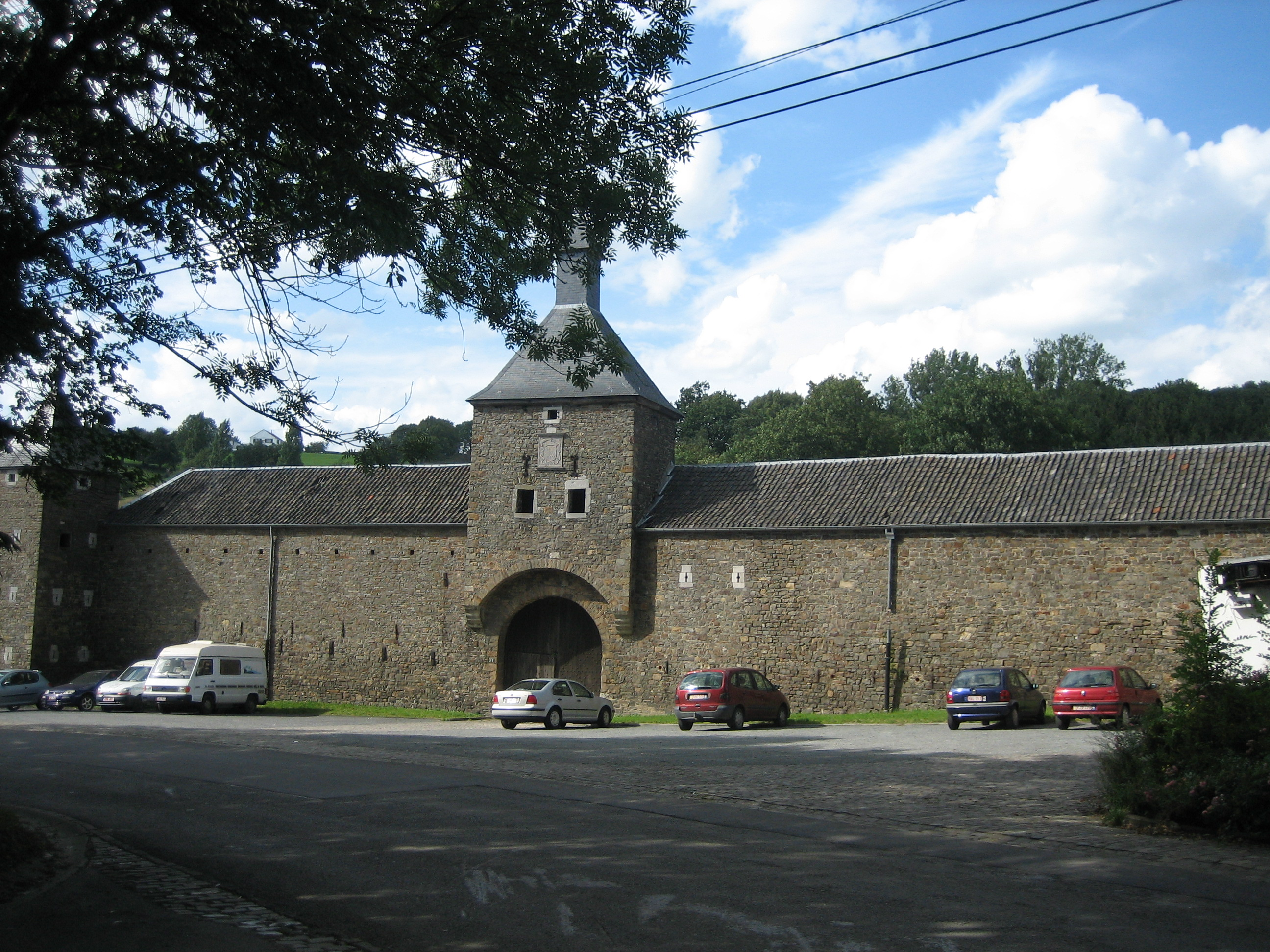 ferme du château de Bolland.Jpg